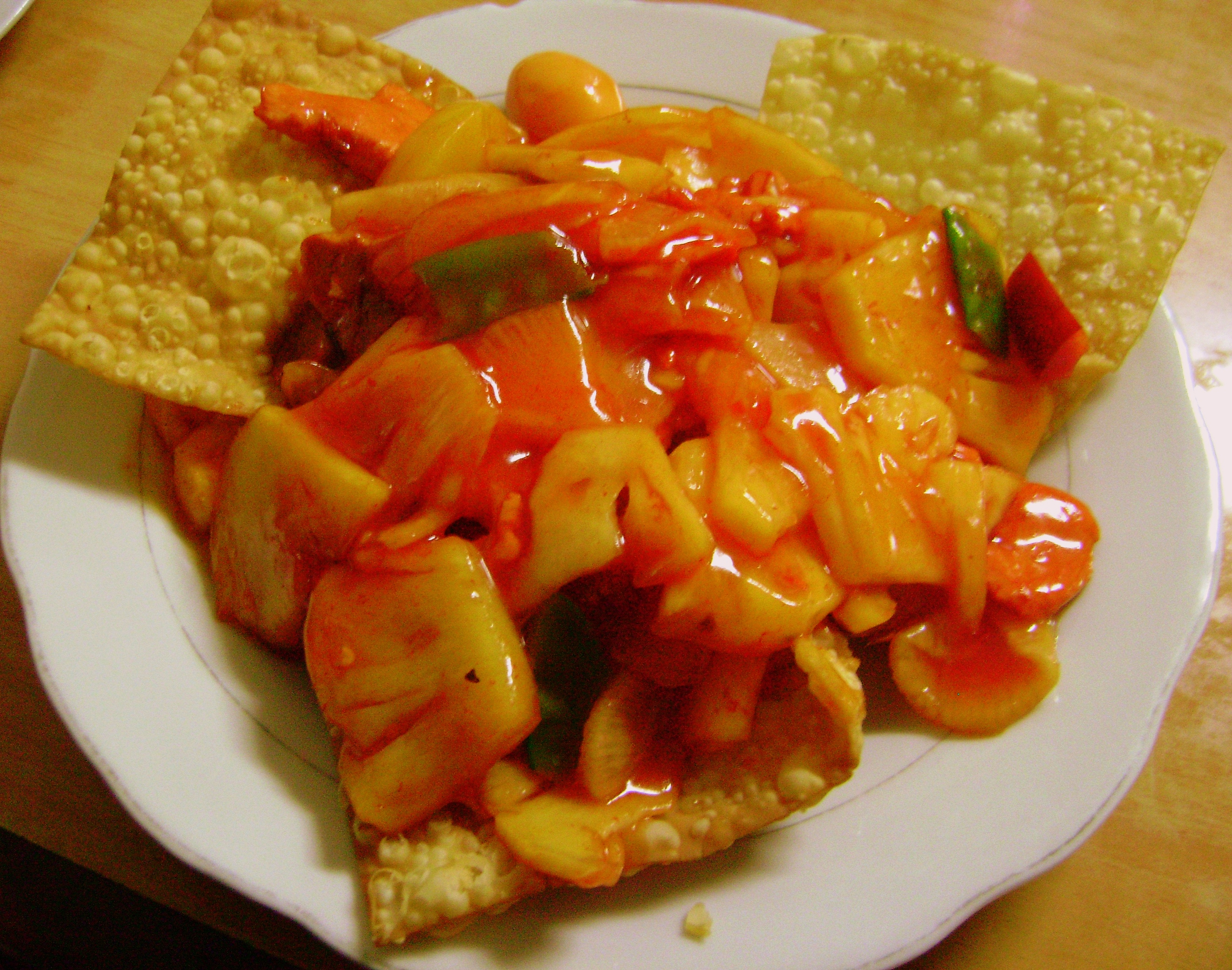 Kam lu wantán. Lima, Perú.